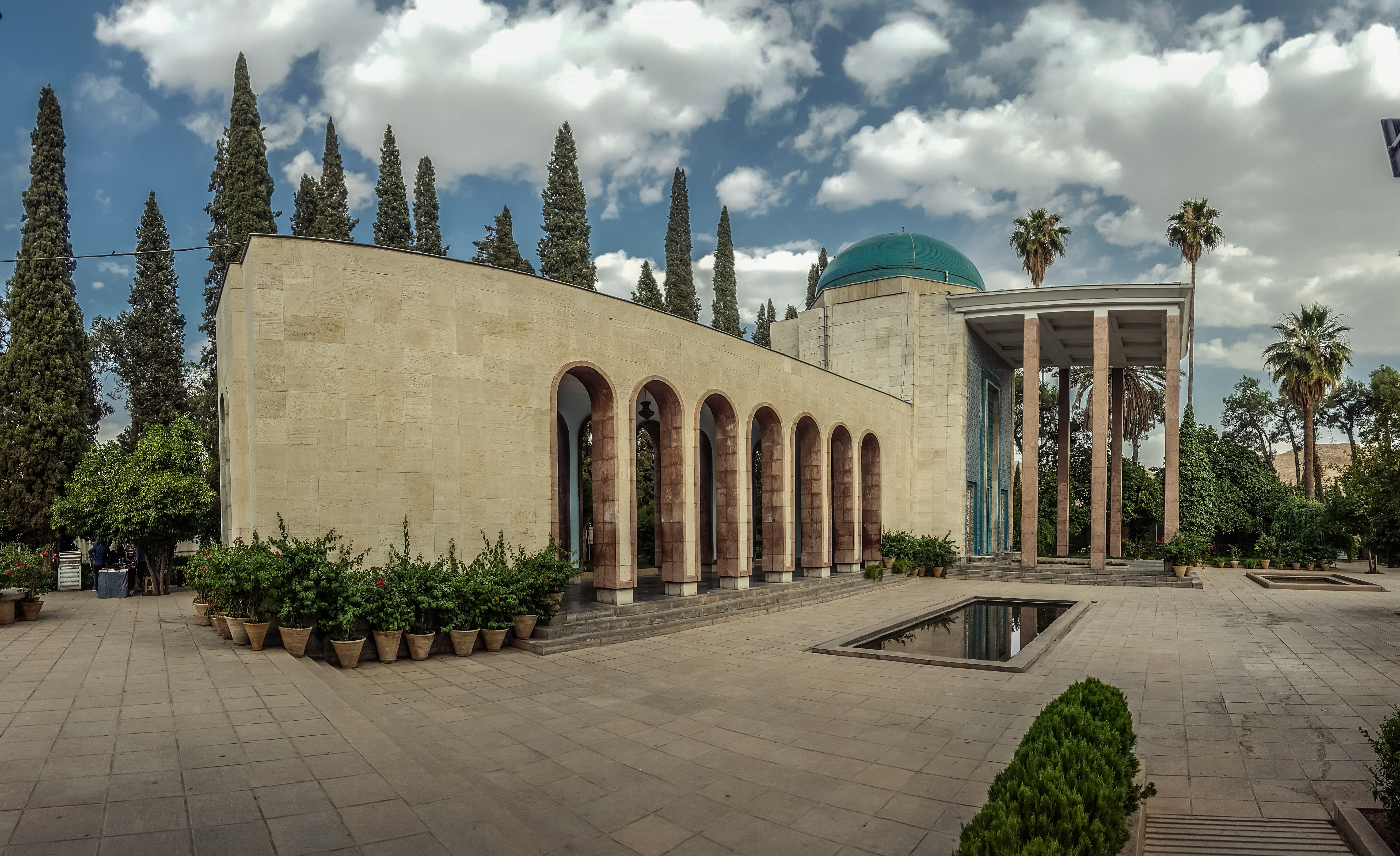 سعدیه